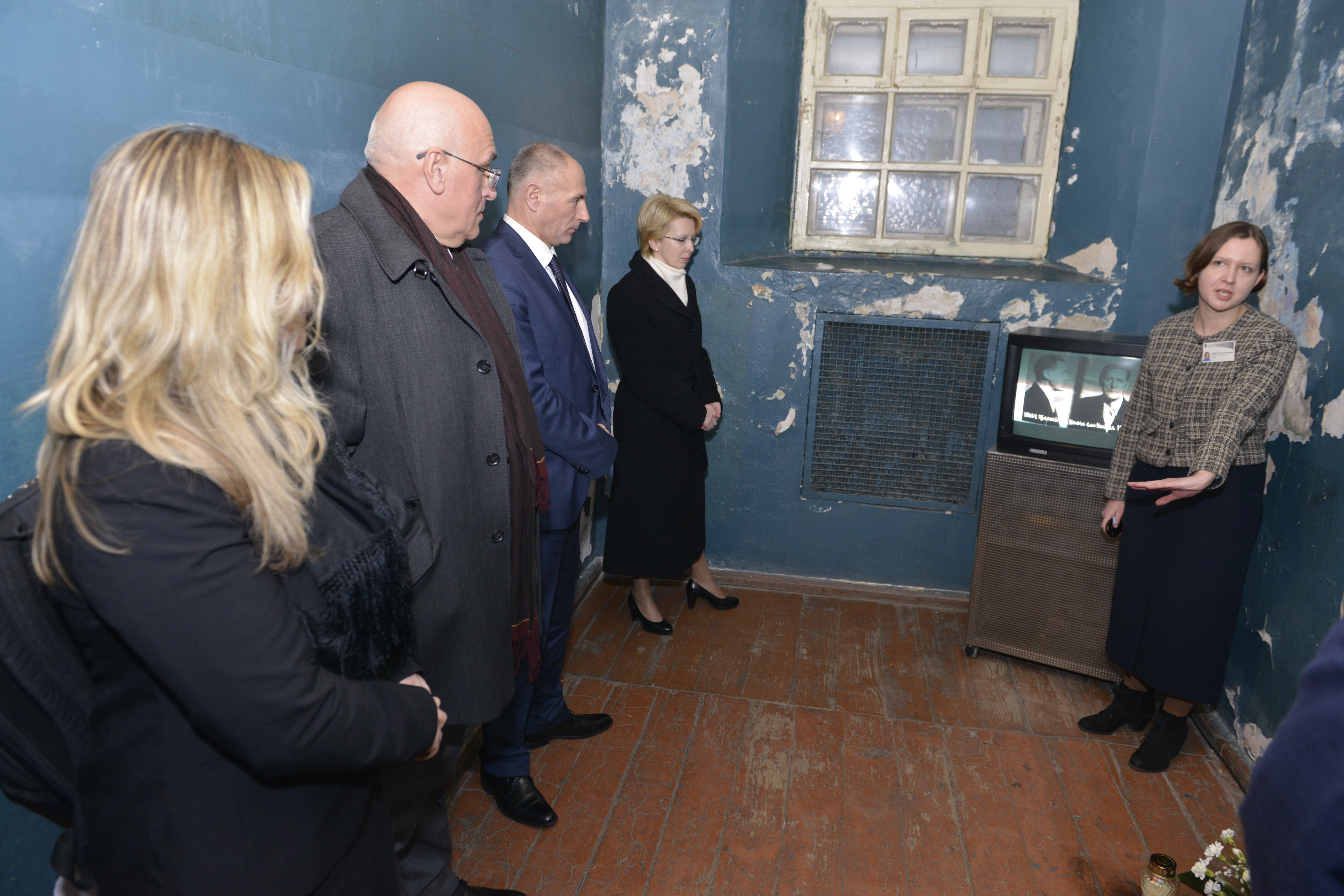 2014.gada 28.novembris. Saeimas priekšsēdētāja Ināra Mūrniece un delegācija vizītes Lietuvā laikā apmeklē Genocīda upuru piemiņas muzeju. Foto: Reinis Inkēns, Saeimas Kanceleja Izmantošanas noteikumi: saeima.lv/lv/autortiesibas